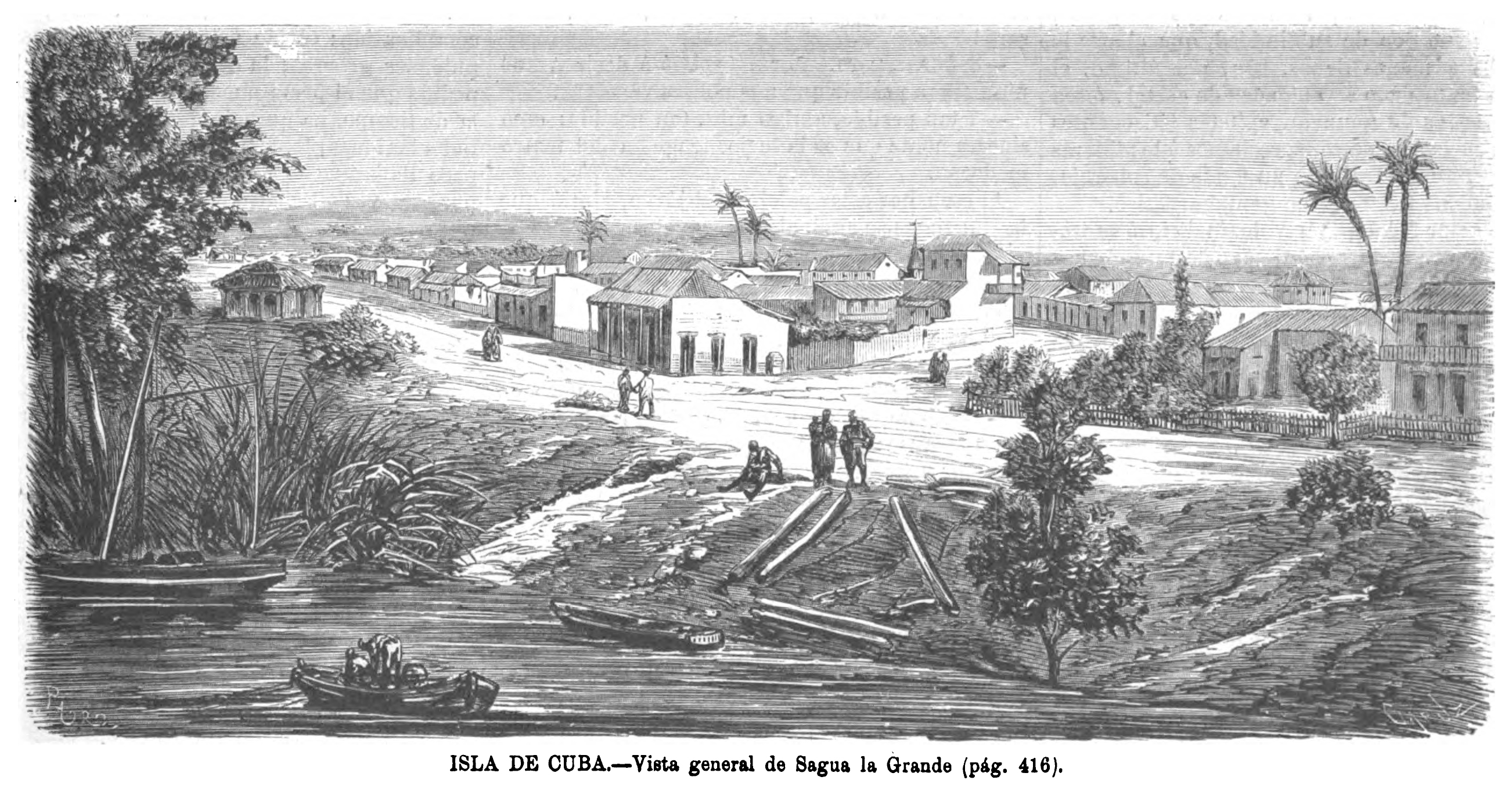 Isla de Cuba.—Vista general de Sagua la Grande.